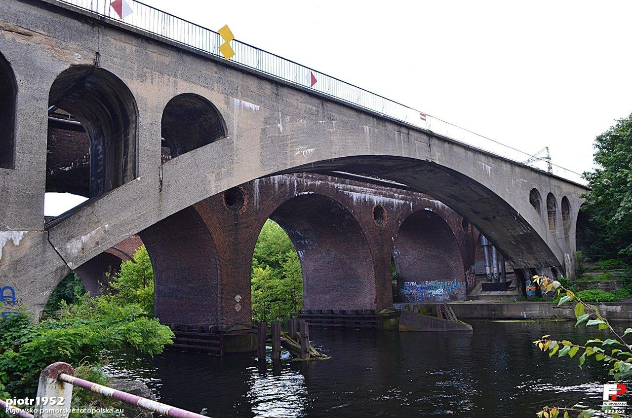 Most